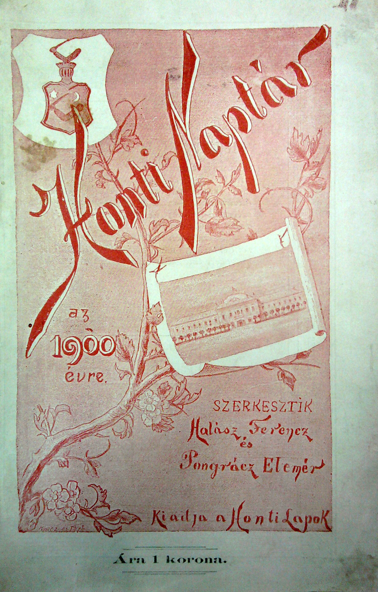 Honti Naptár, 1900, szerkesztö Pongrácz Elemér